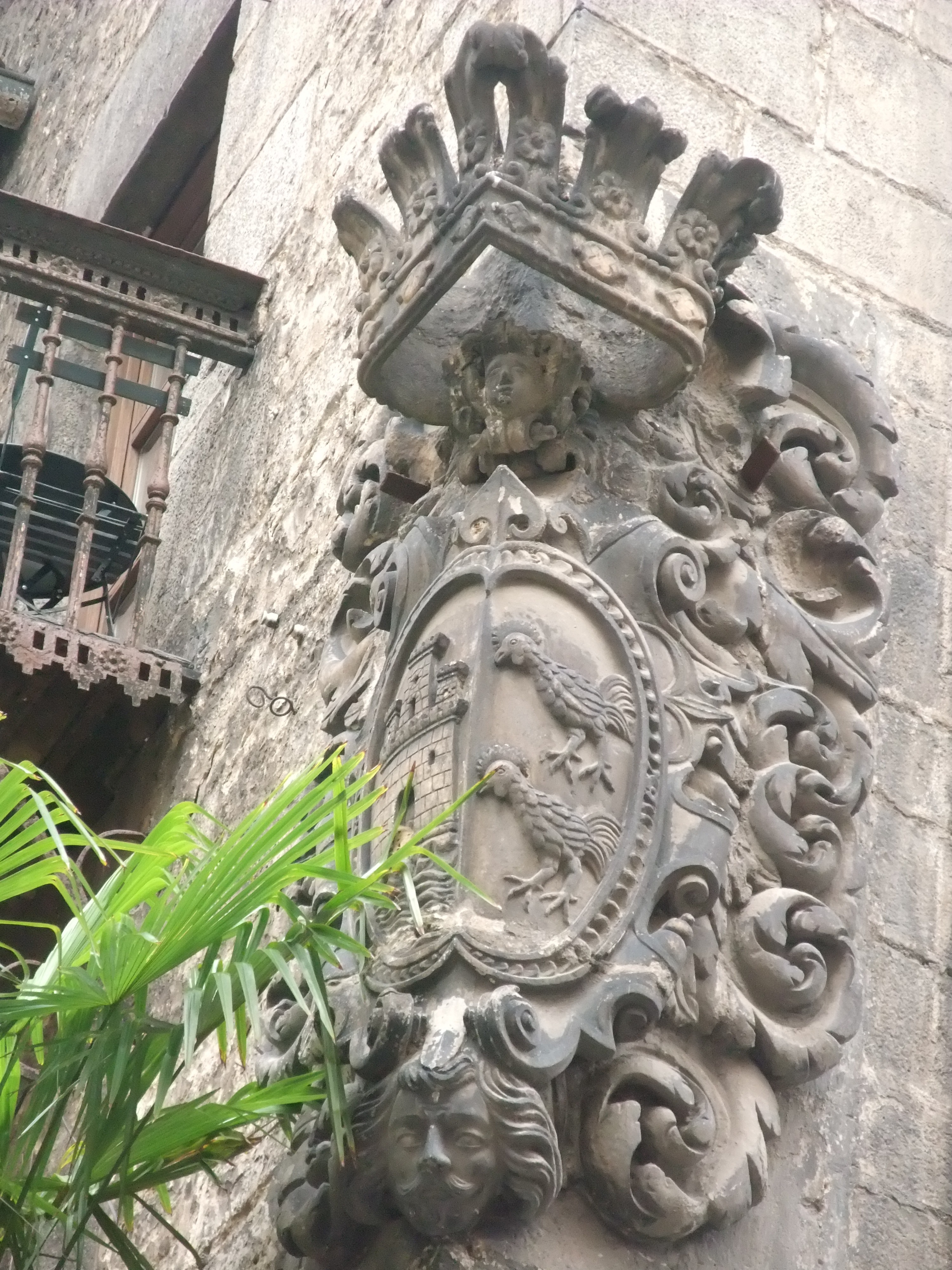 Vergara (Guipúzcoa)-Casa Moiua-Barrena-2